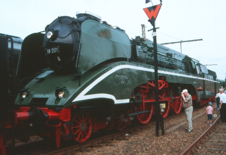 DR Baureihe 18 201